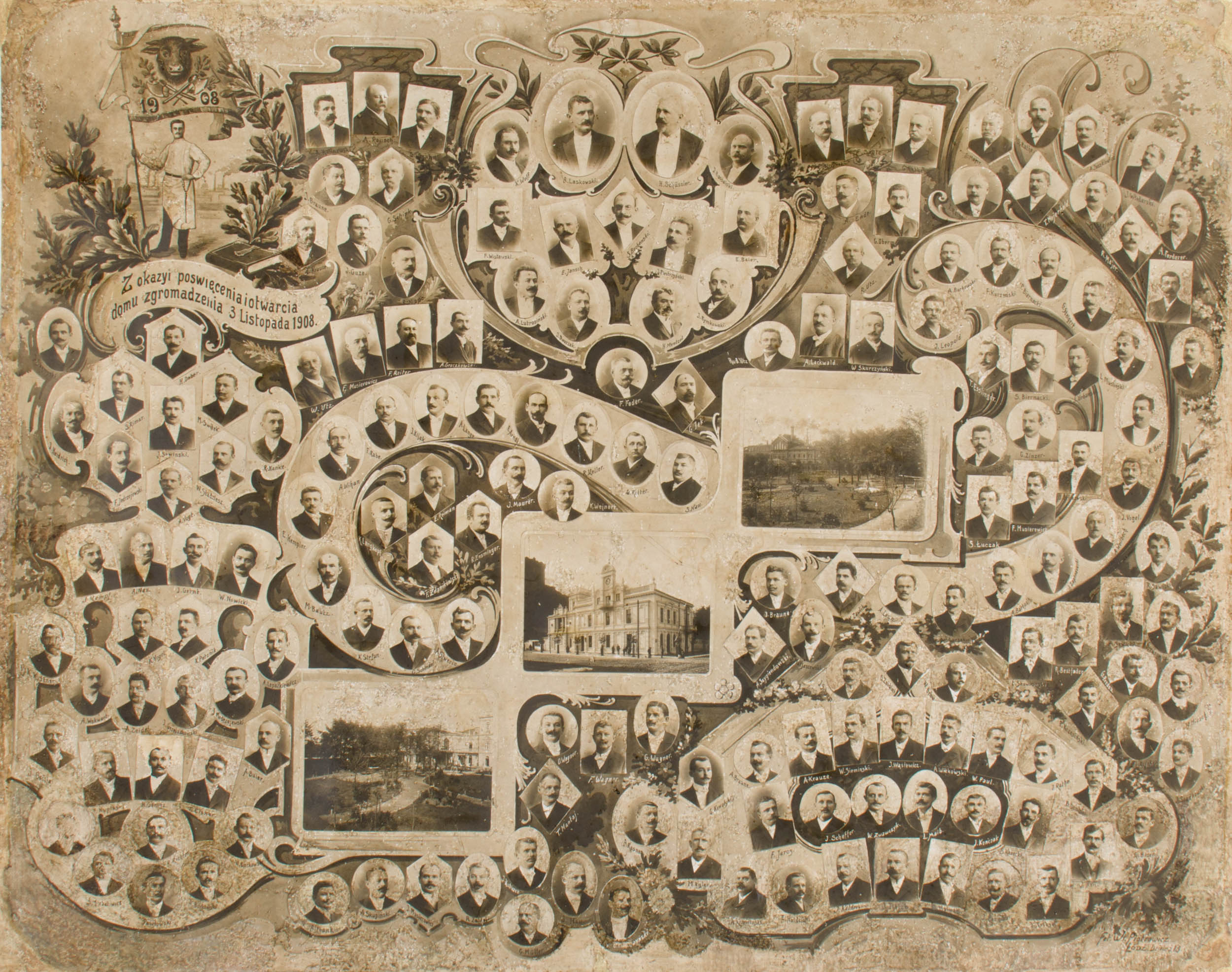 Tableau z okazji poświęcenia i otwarcia domu Zgromadzenia Cechu Rzeźników znajdującego się na rogu ulic Milscha i Łąkowej (dzisiaj u zbiegu ul. Łąkowej i Kopernika) w dniu 3 listopada 1908 roku. Na tableau umieszczono zdjęcia członków Zgromadzenia, a także budynek w którym siedzibę miało Zgromadzenie Rzeźników w Łodzi.